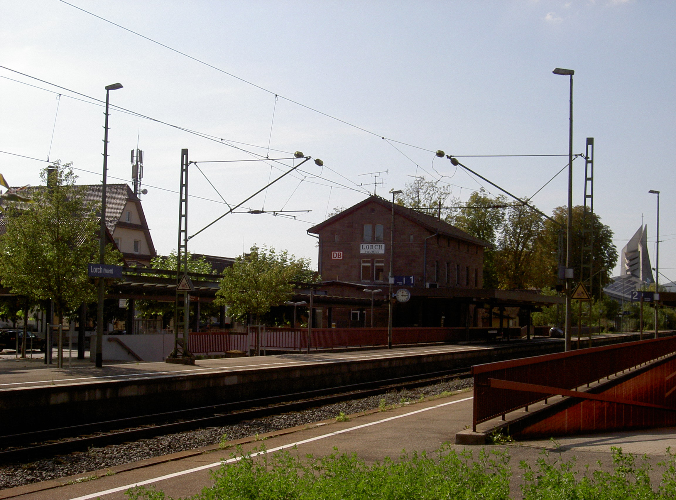 Bahnhof Lorch (Württ).